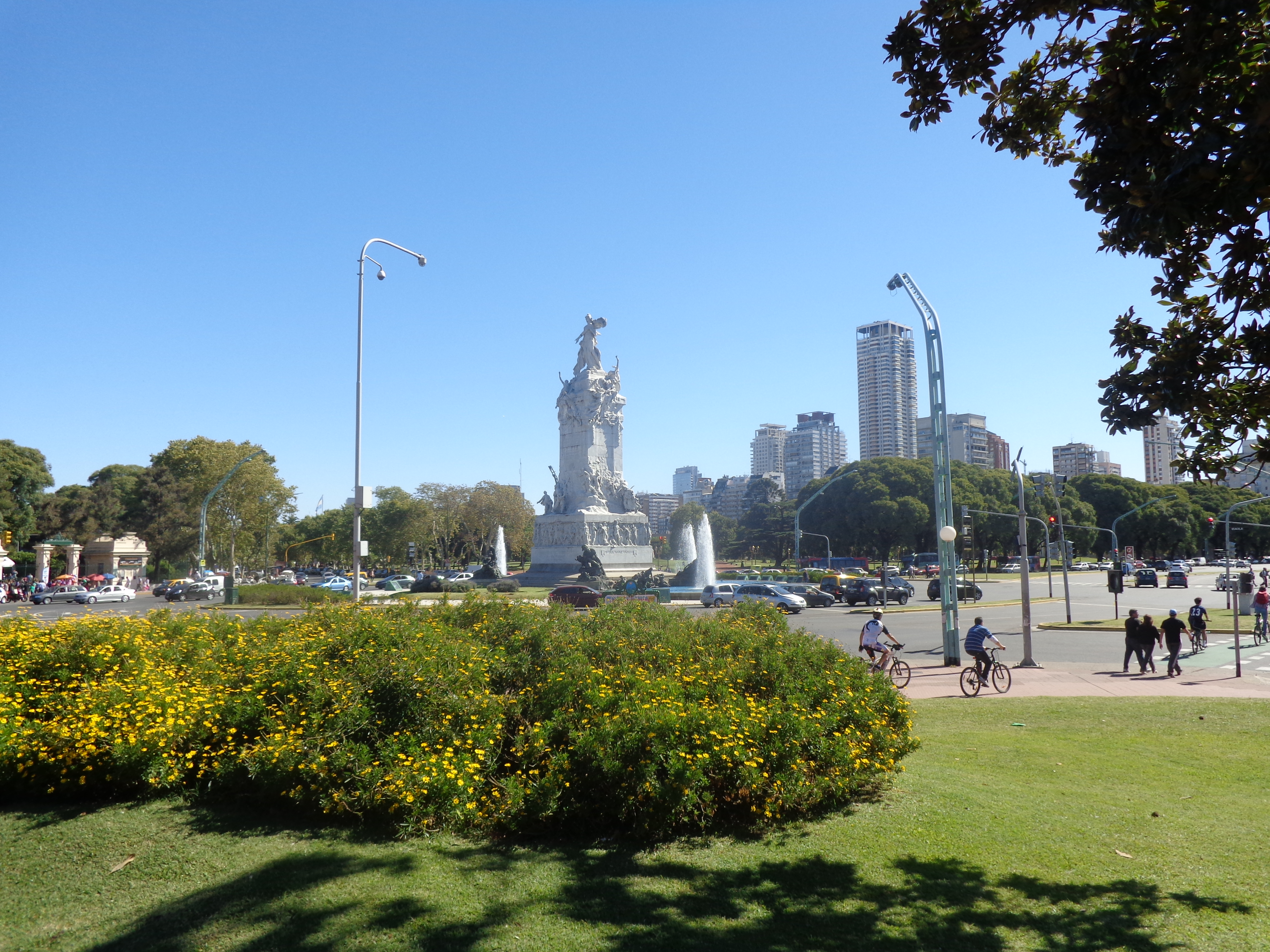 Monumento a La Carta Magna y las Cuatro Regiones Argentinas o De los Españoles. Buenos Aires, Argentina